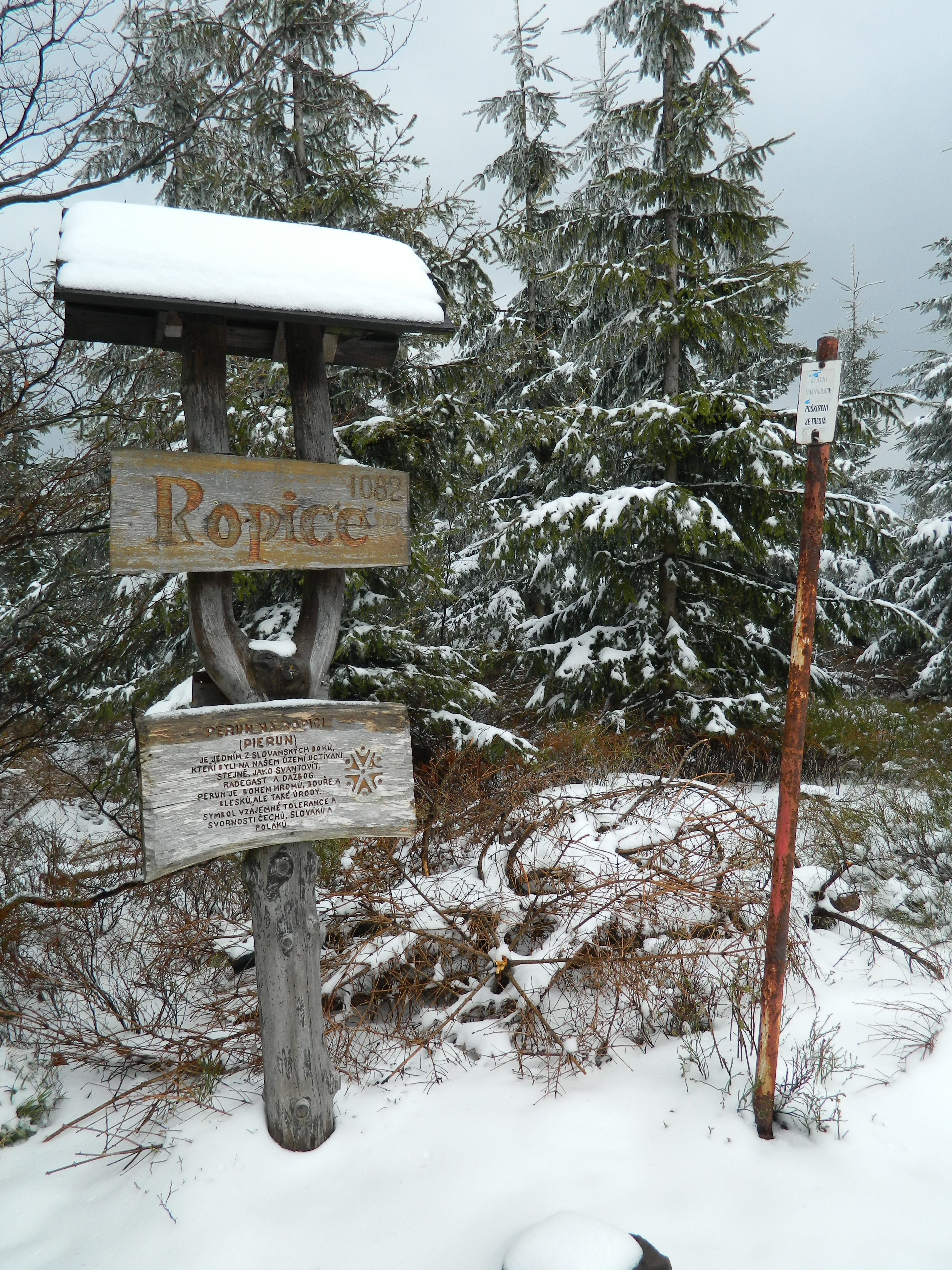 Informační panel na vrcholu hory Ropice